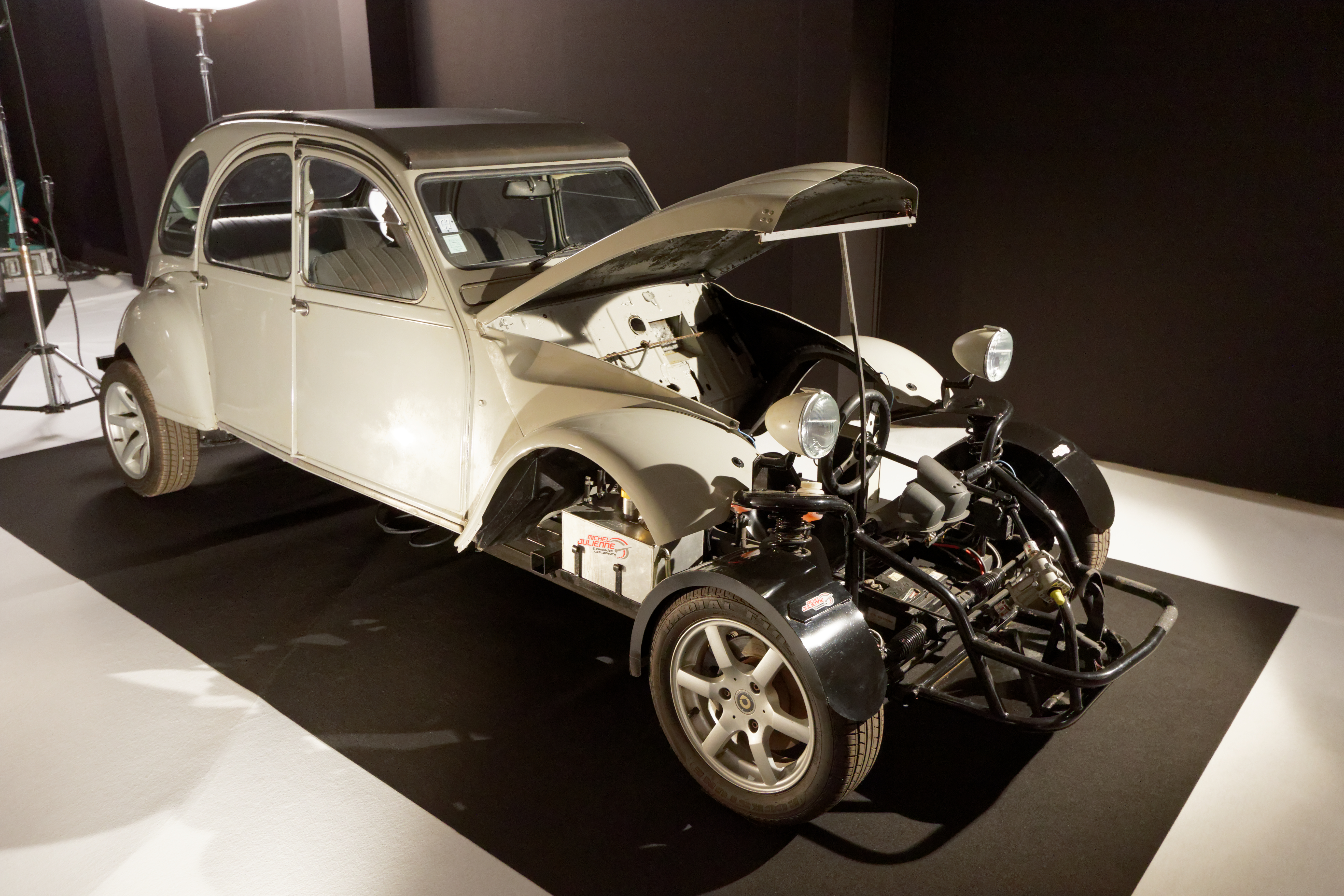 Une Citroën 2CV Go-Mobile de 2013 présentée lors du mondial de l'automobile de Paris 2016. Ce véhicule a été utiisé sur le tournage du film RED 2.